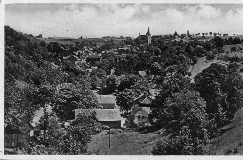 Obecna-historie